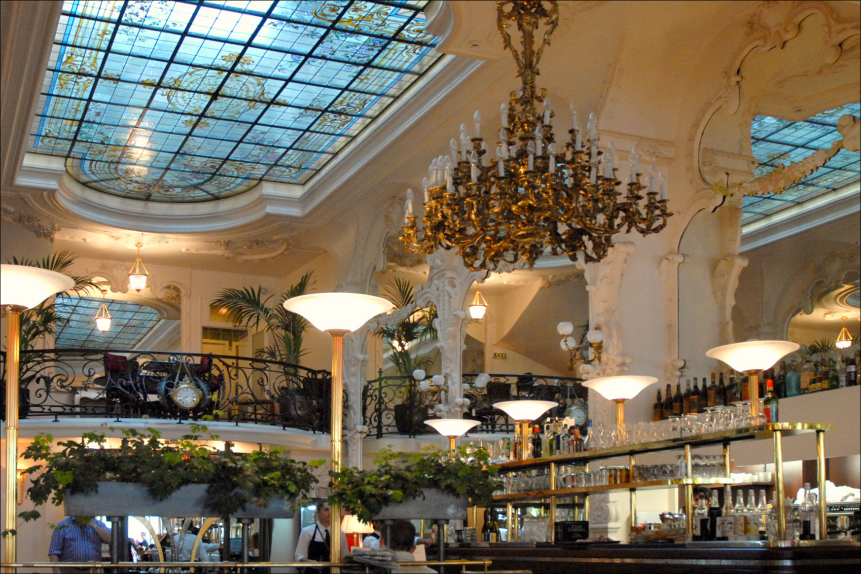 Le Grand Café, bar-brasserie sur la place d'Allier, est l'un des plus beaux de France. Inscrit à l'Inventaire des Monuments Historiques, il a conservé sa décoration de 1899. De style Art nouveau (certaines parties sont de style art-déco), ses murs sont habillés de miroirs dont les reflets combinés déploient l'espace à l'infini. Selon le site de l'Observatoire de la franchise (Bistrot du boucher), M. Renoux, garçon de café à la brasserie parisienne Lipp avait décidé, avec un architecte italien, Golfione de créer un café brasserie à Moulins. Golfione y réalisa un décor, inspiré par l’Art Nouveau et confia la décoration du plafond à Auguste Sauroy dont la fresque représente la légende de Gambrinus, divinité à laquelle on attribue l’invention de la bière. Ce serait également dans ce décor que Gabrielle Chanel aurait acquis son surnom de « Coco » en interprétant quelques chansonnettes au balcon du Grand Café, lieu mythique qui fut aussi fréquenté au fil des ans par d'autres célébrités.